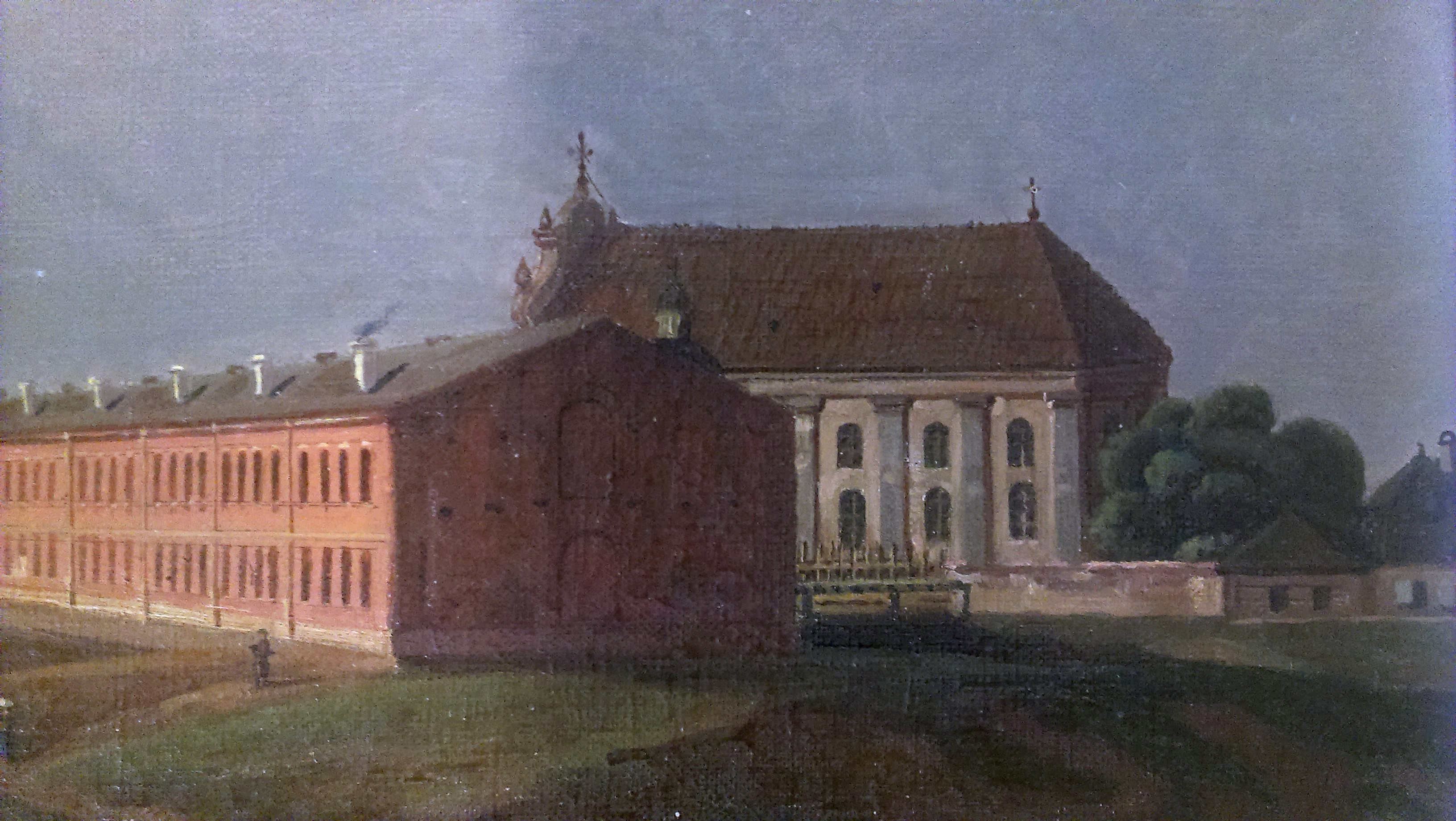 Беларуская (тарашкевіца): Берасьце (Bieraście), Заўгрынецкае прадмесьце (Zaŭhrynieckaje pradmieściе). Касьцёл Сьвятой Соф'і пры кляштары дамініканаў